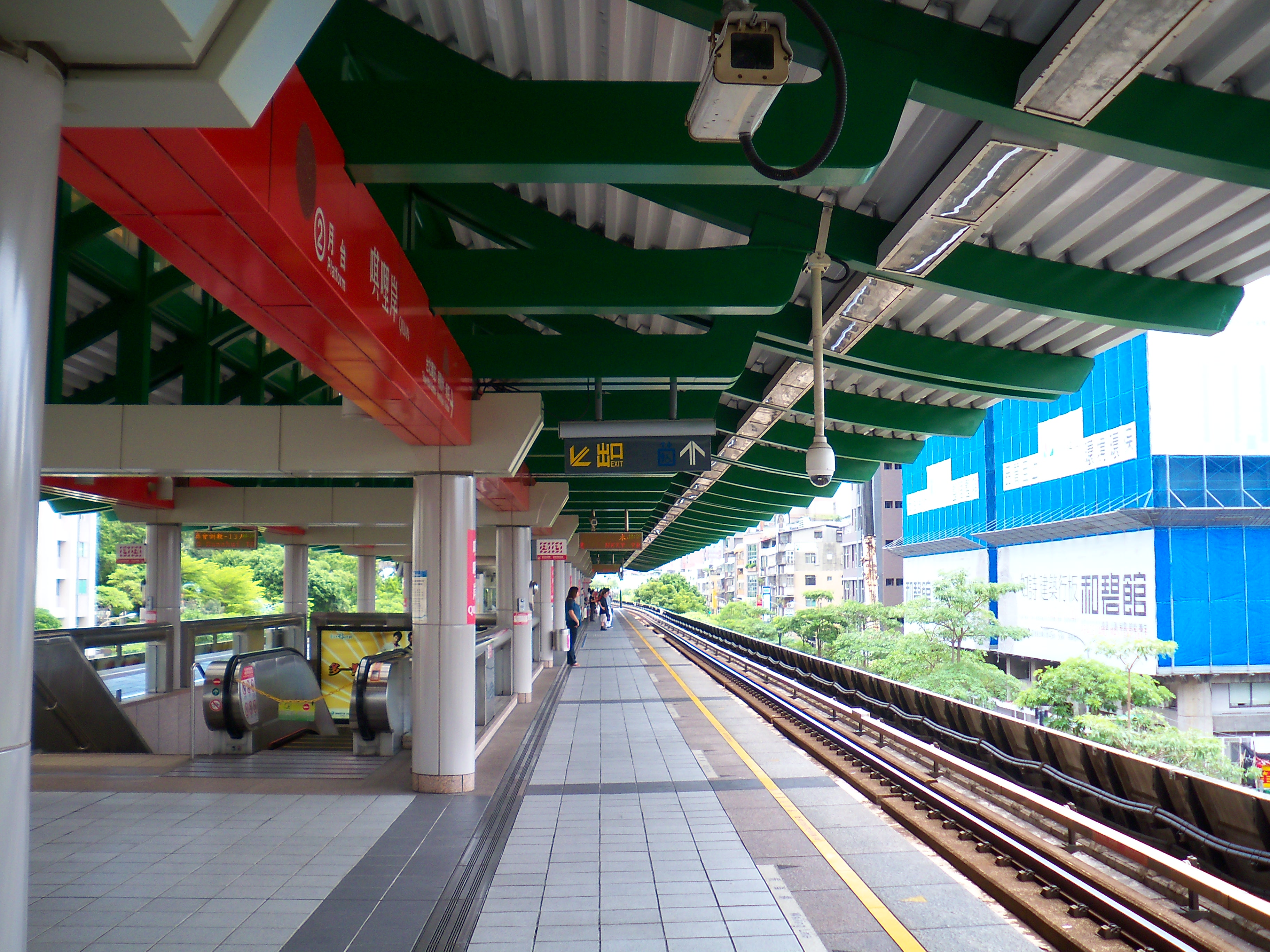 中文（台灣）: 台北捷運淡水線唭哩岸站第二月台。